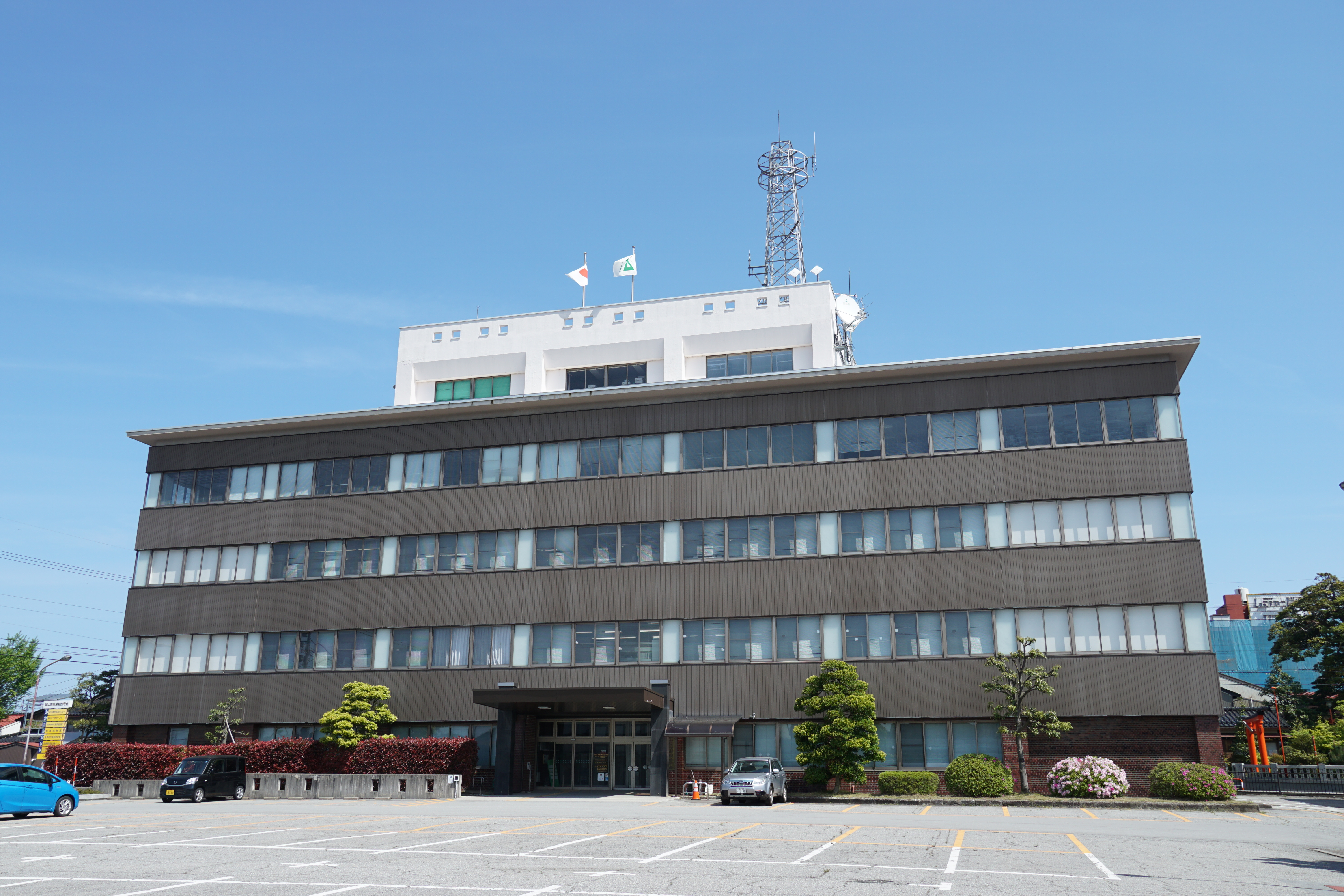 富山県魚津総合庁舎を日曜日の午前中に南側から撮影。